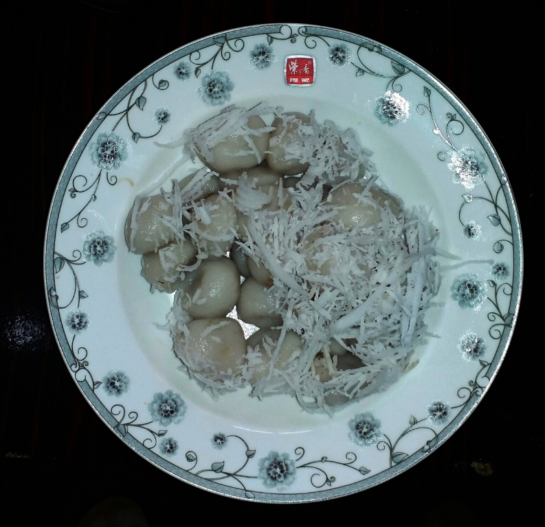 မြန်မာဘာသာ: မုန့်လုံးရေပေါ်သည် ကောက်ညှင်းဖြင့် ပြုလုပ်သည့် မြန်မာ့ သွားရည်စာ တစ်မျိုးဖြစ်သည်။ ကောက်ညှင်းလုံးအား ရေနှင့်ပြုတ်ရာတွင် ကောက်ညှင်းကျက်ပါက ရေပေါ် ပေါ်လာသည့် အတွက် မုန့်လုံးရေပေါ်ဟု ခေါ်သည်။ မြန်မာ့ရိုးရာအလိုက် တန်ခူးလတွင် မုန့်လုံးရေပေါ်များဖြင့် အလှူလုပ်လေ့ရှိသည်။